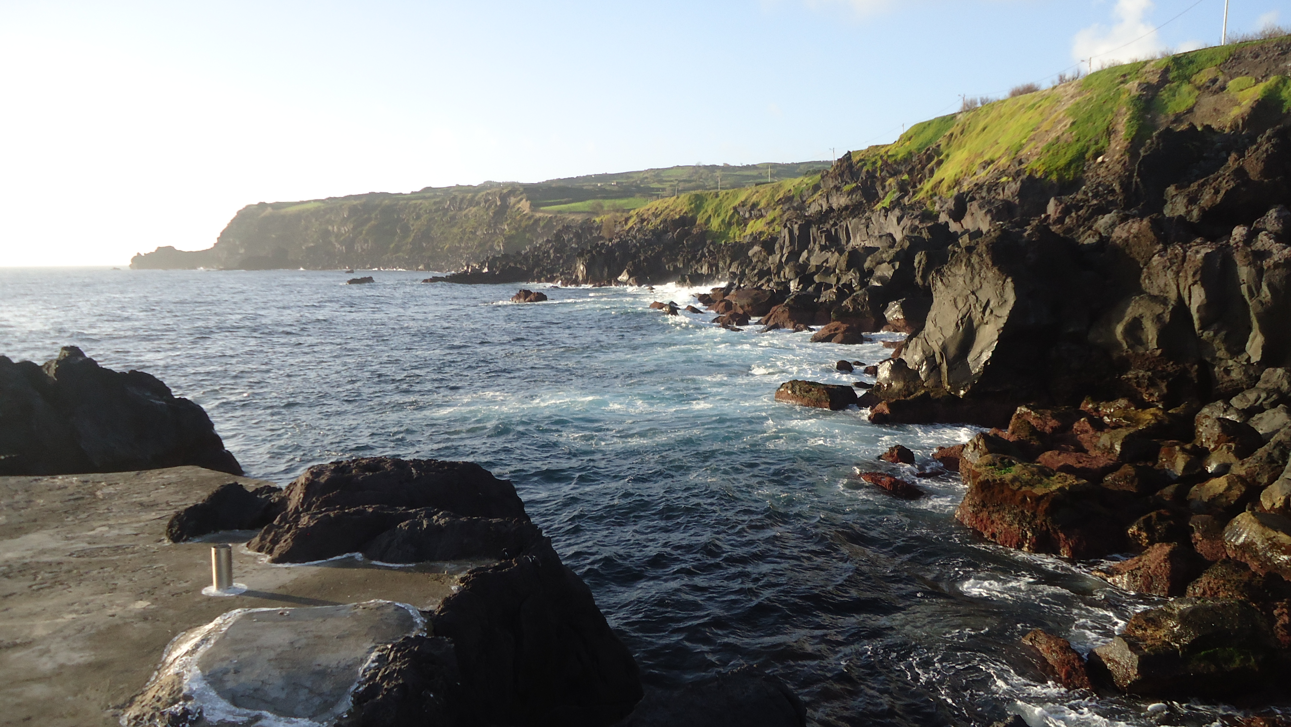 Uma fotografia captada num lindo final de tarde na freguesia das Cinco Ribeiras, na Ilha Terceira, nos Açores.